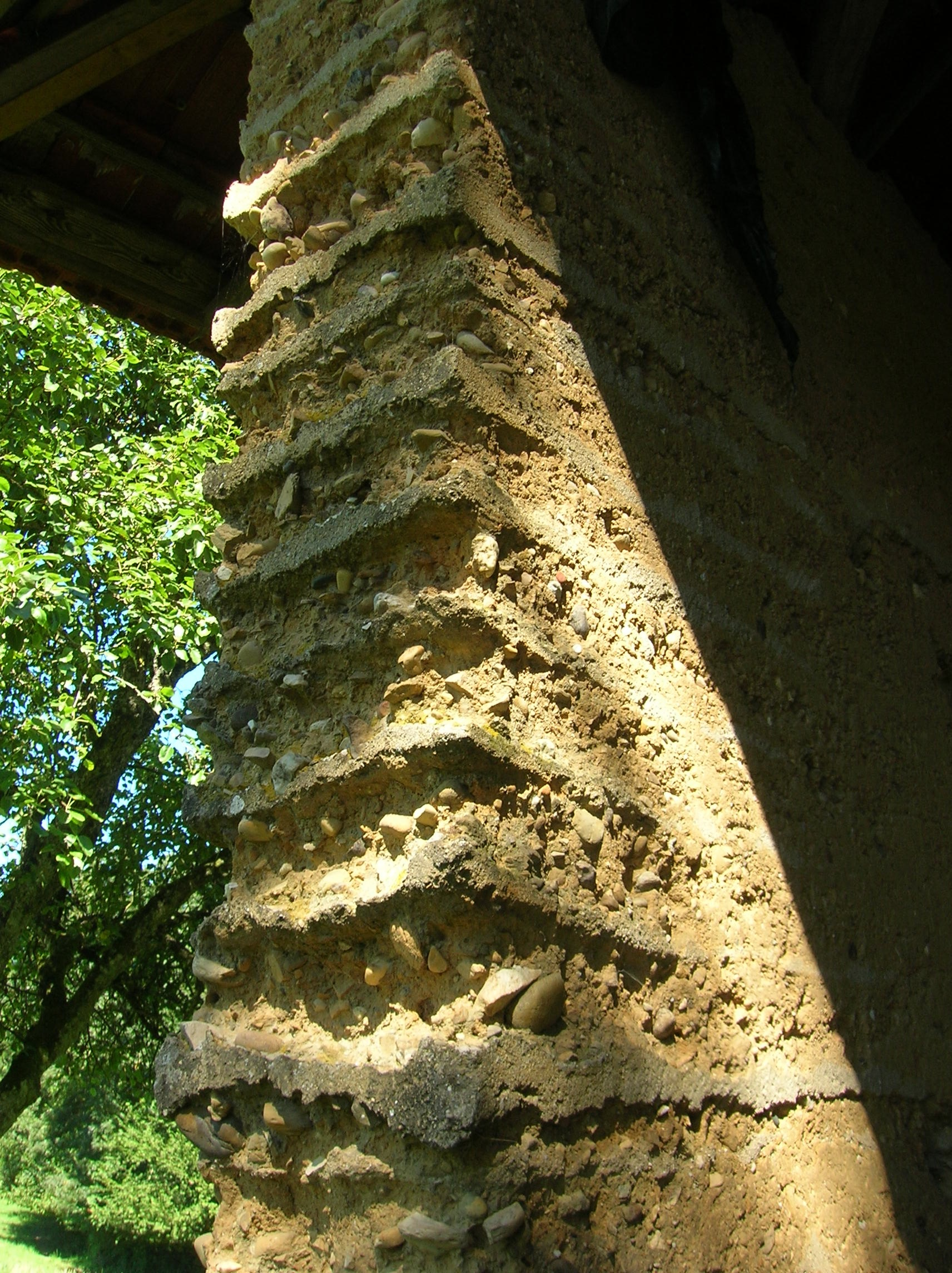 grange en pisé à Chassignieu, Isère, AuRA, France.